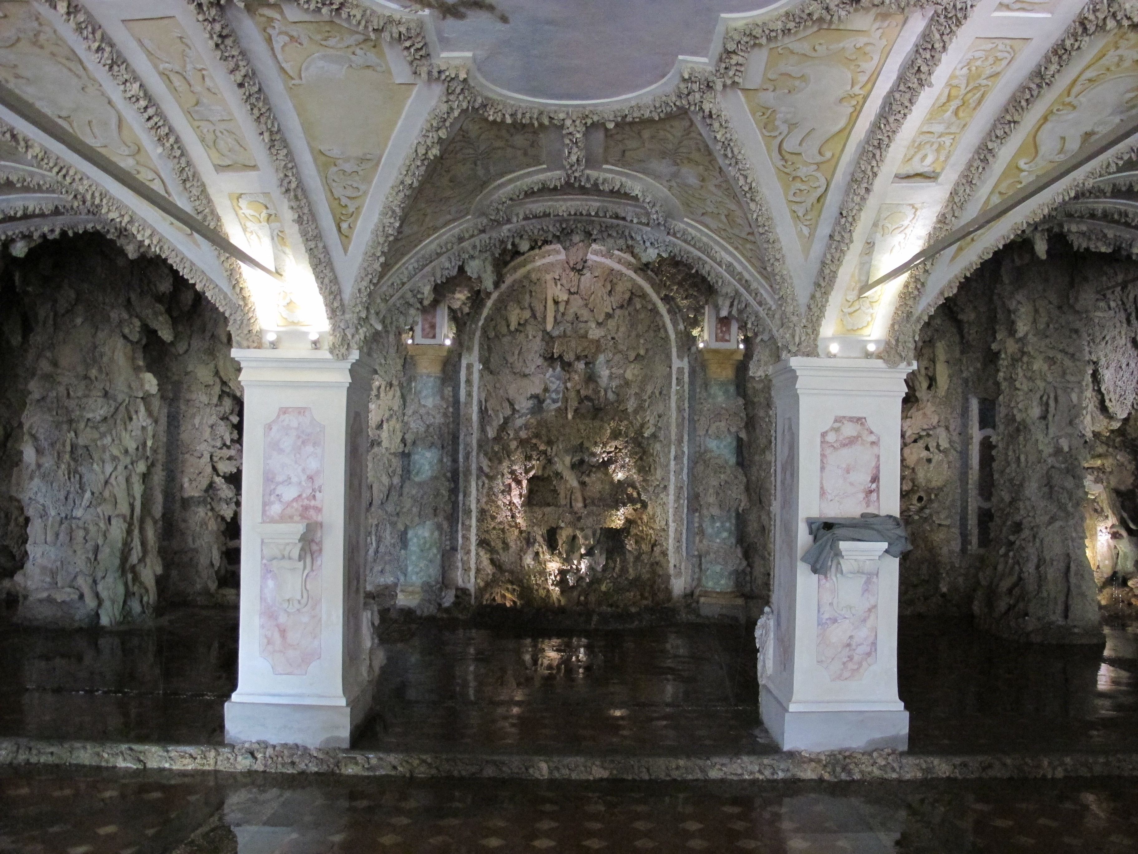 Villa salviati, grotta, prima zona